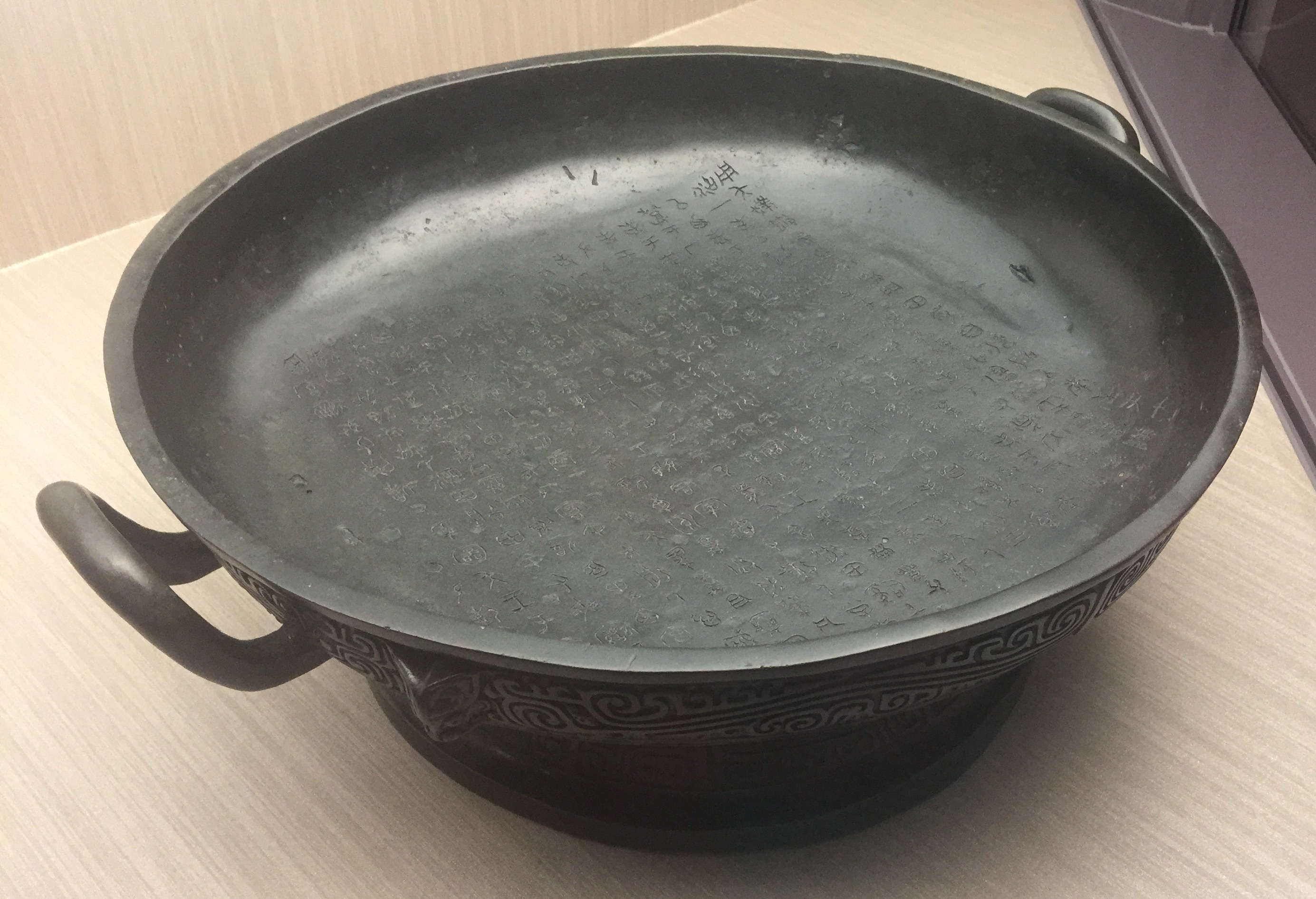 散氏盤，西周时期，國立故宫博物院館藏。